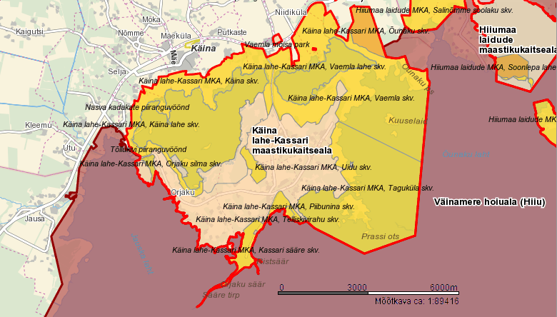 Käina lahe - Kassari MKA Maa-ameti kaardil.